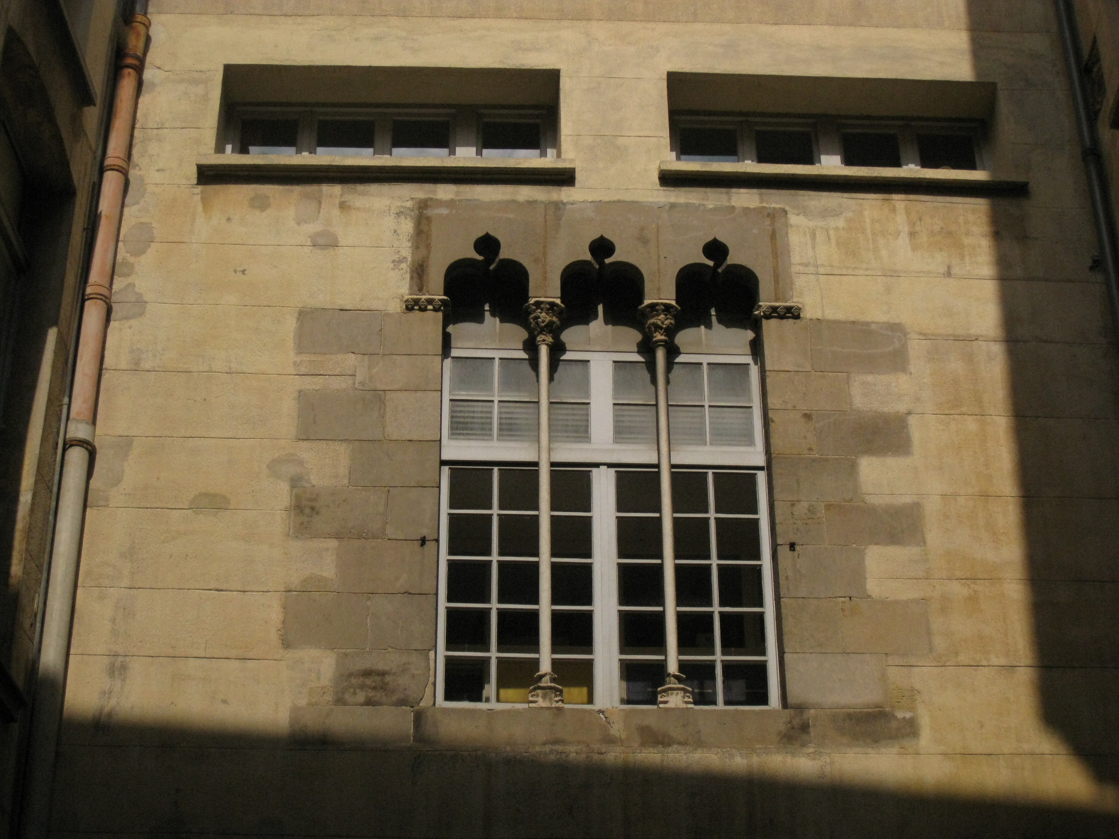 Palau de la Generalitat o de la Diputació, a Perpinyà; finestra coronella al pati .